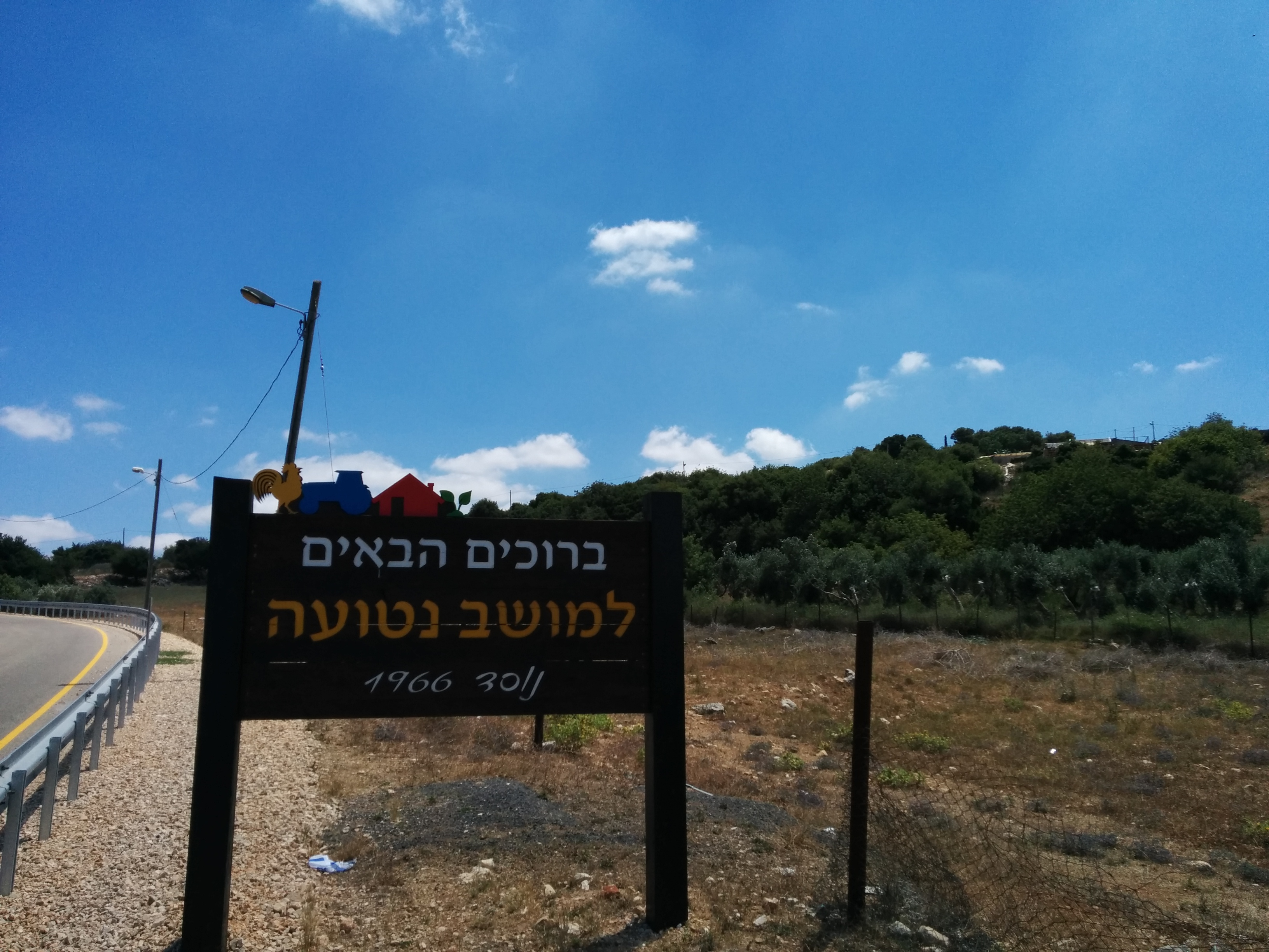 שלט כניסה וברקע המושב נטועה שבישרא